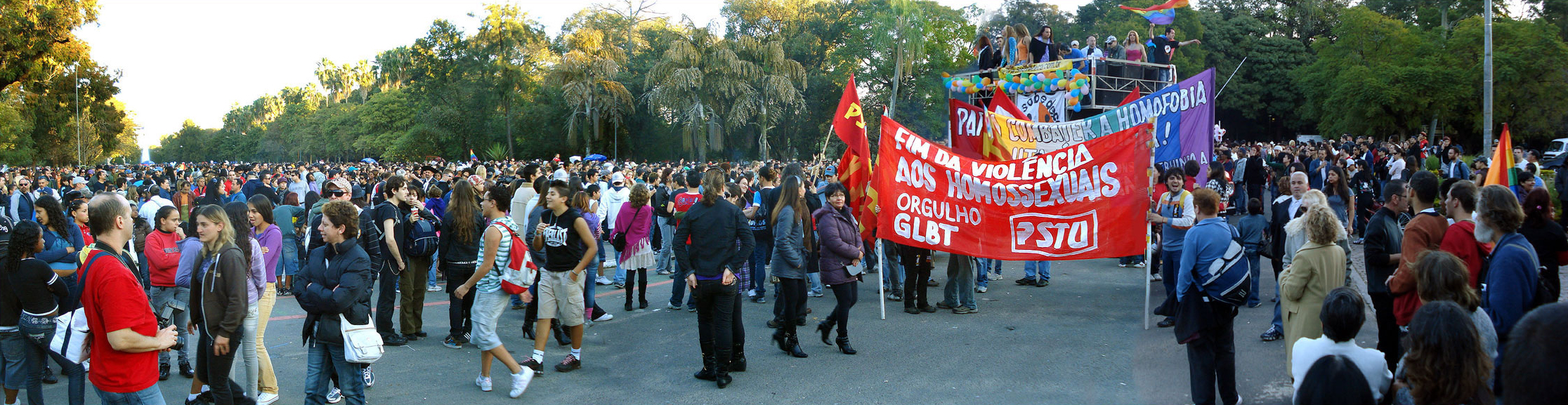 Parada Livre GLBT em Porto Alegre, 2009